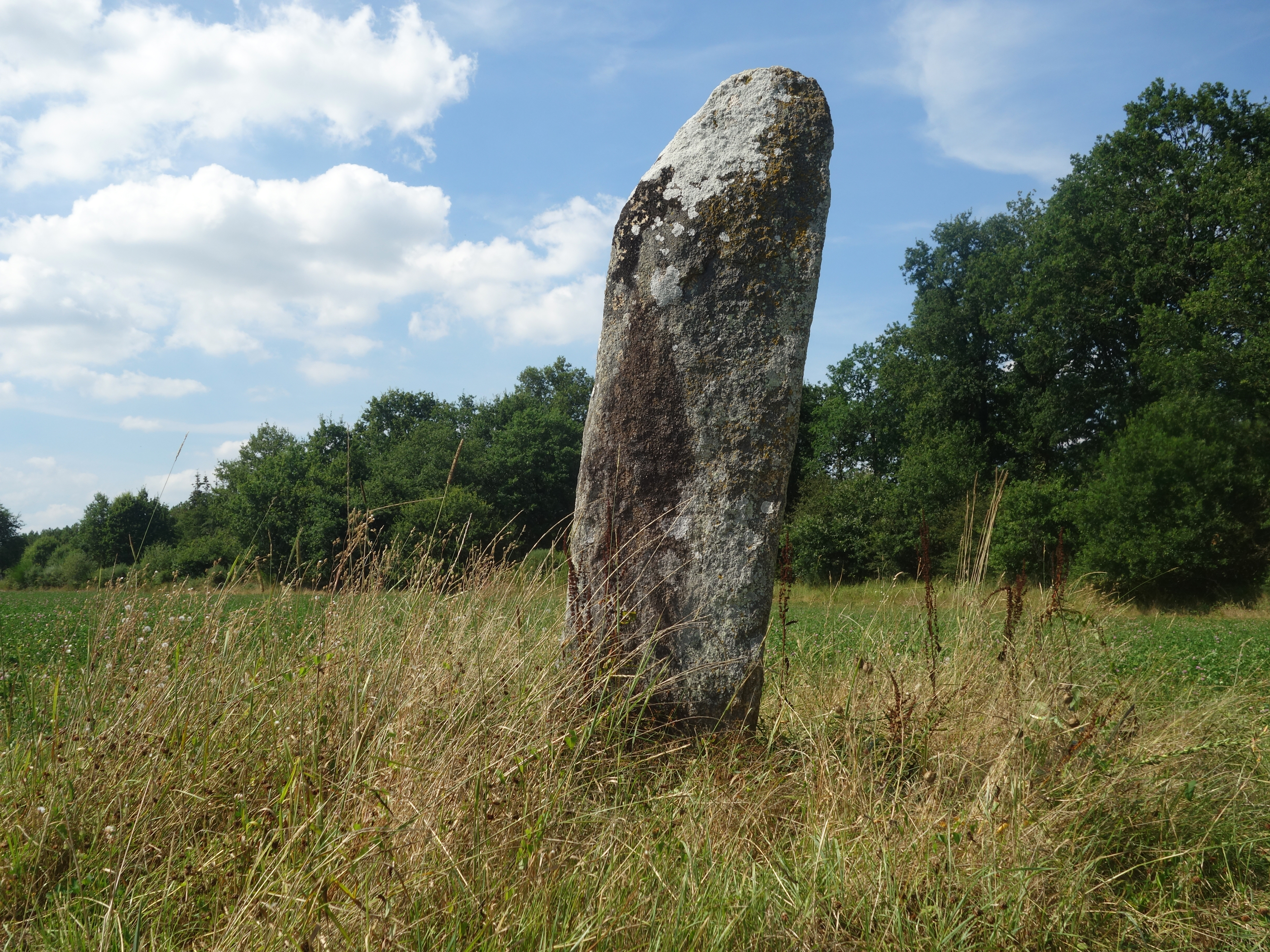 Près de Pleucadeuc, à 1 kilomètre à l'ouest du bourg, le « Menhir des Hautes Landes » est un joli petit menhir planté dans un champ offrant une vaste perspective !